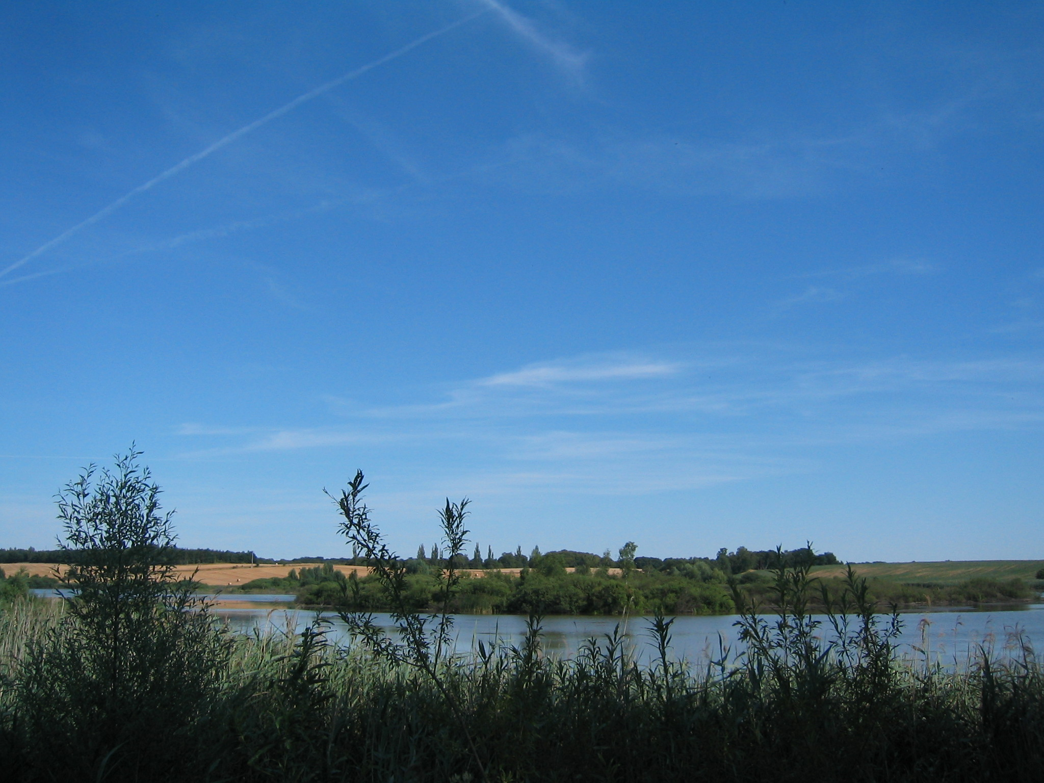 (Grosser) Plötzsee bei Görlsdorf und Peetzig in der Uckermark.